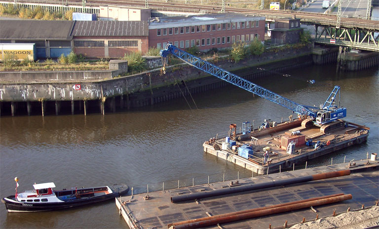 Ponton auf dem Oberhafen in Klostertor